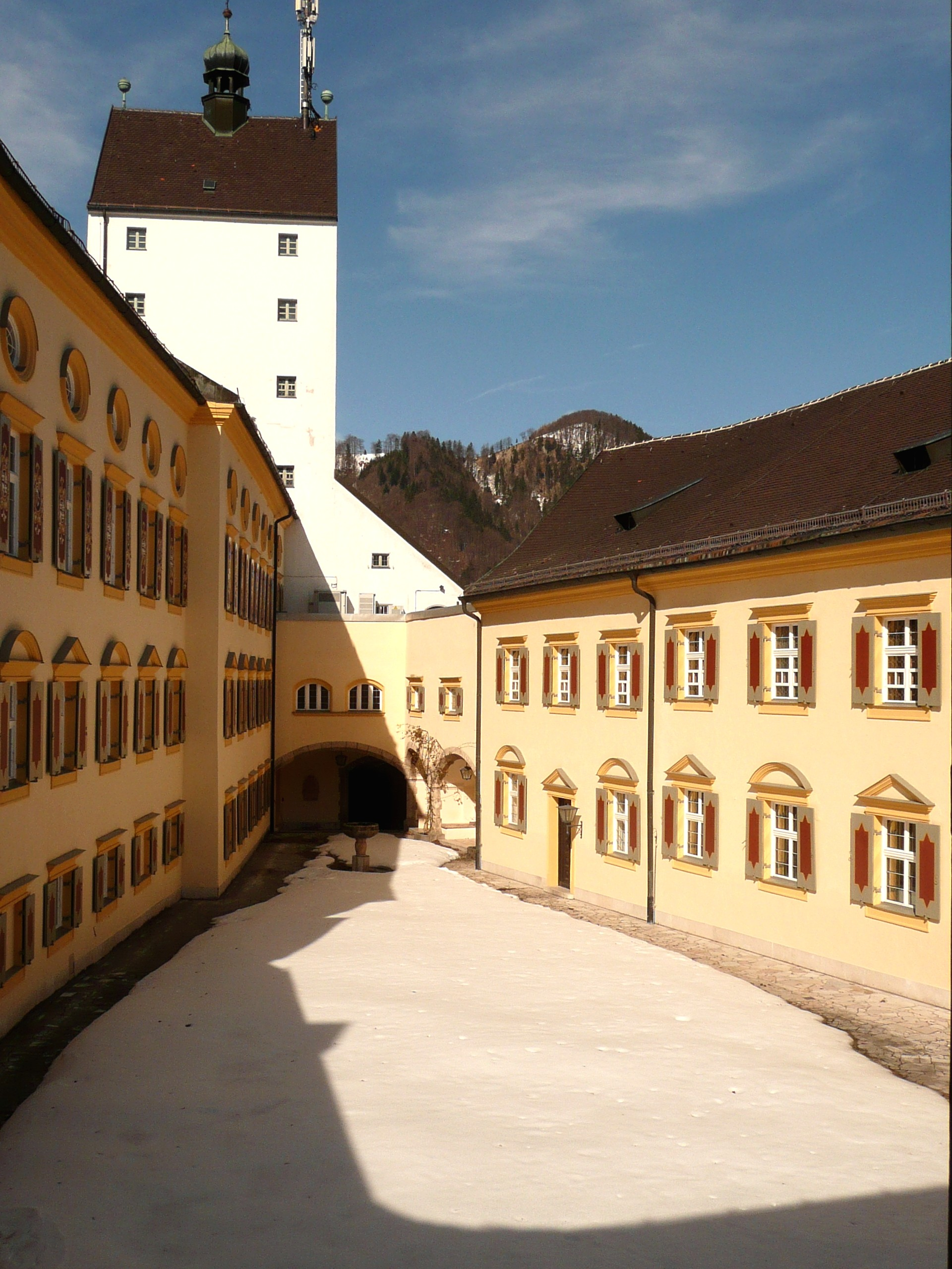 Der Innenhof mit Blick zum Torturm. Der Boden des Hofes ist teilweise noch Schneebedeckt.